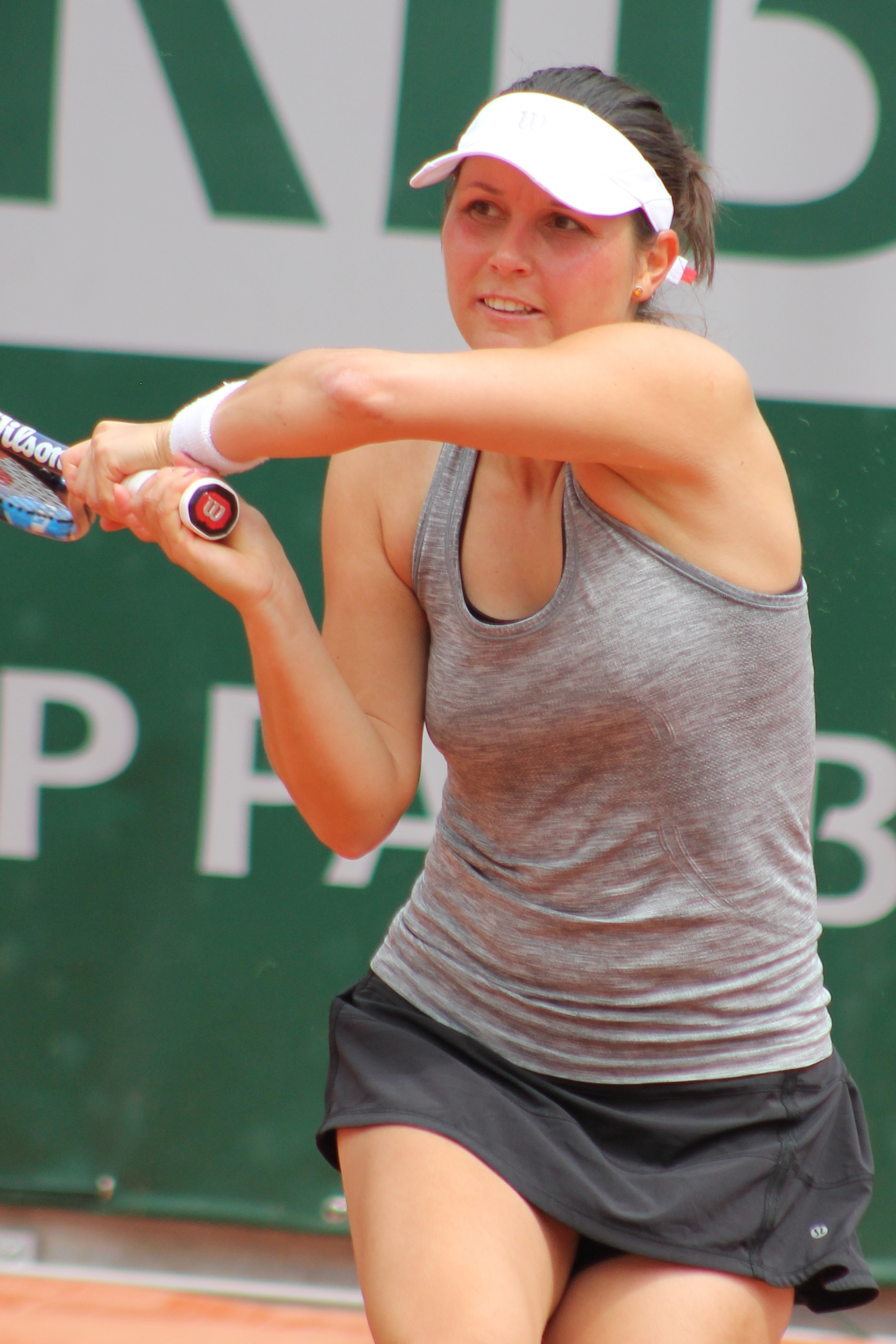 Jans Ignacik RG16 (1)